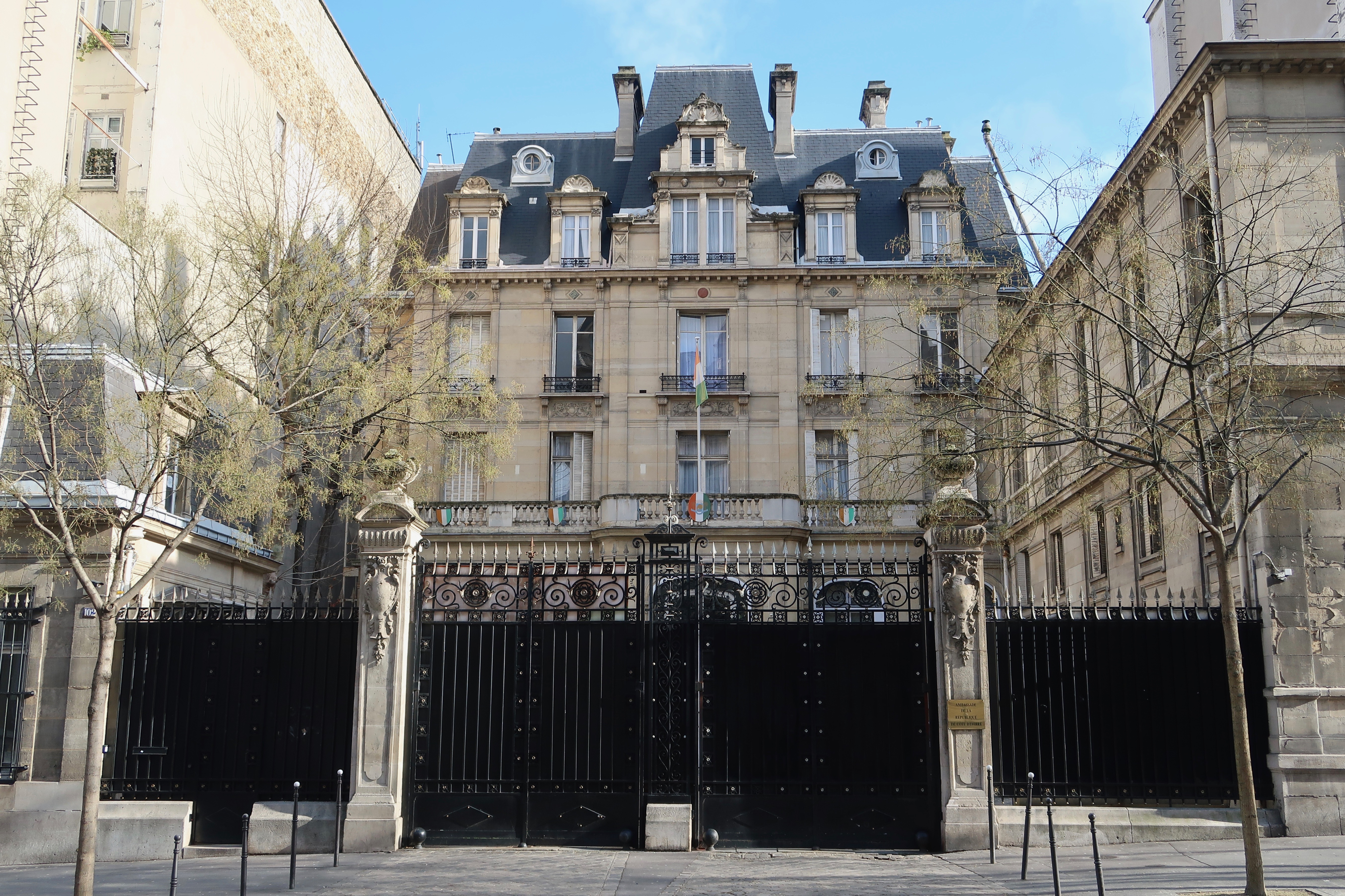 Ambassade de Côte d'Ivoire en France, 102 avenue Raymond-Poincaré (Paris, 16e).